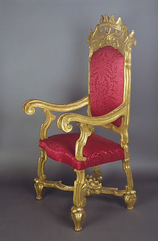 Fauteuil de circoncision dit "Fauteuil d'Elie" ayant appartenu à Zadoc Kahn, grand rabbin de France, Italie du Nord 17e-18e siecle